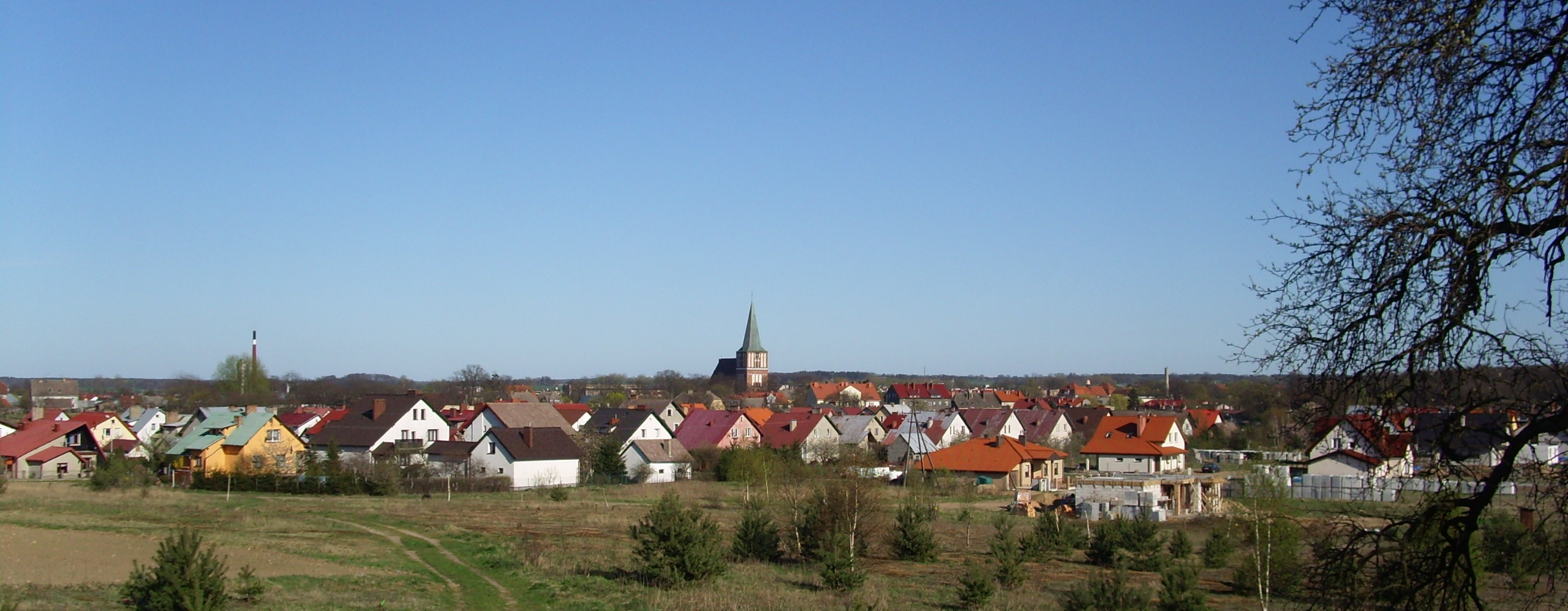 Panorama Drawska Pomorkiego